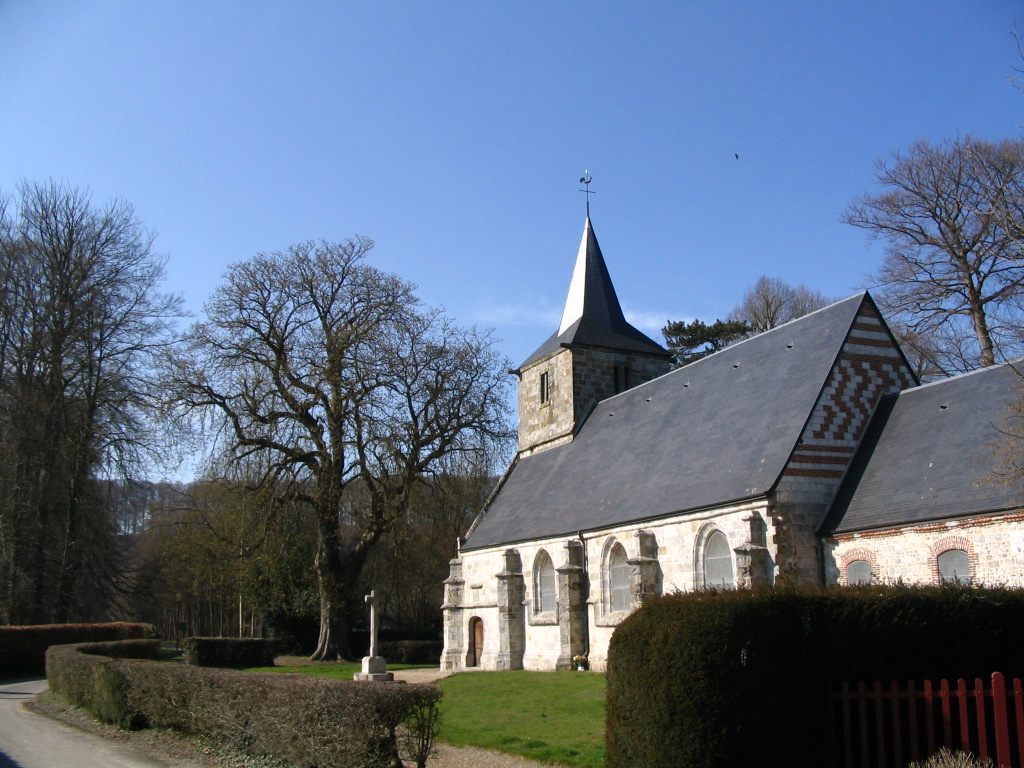 La chapelle de Barville, à Cany-Barvile, France.